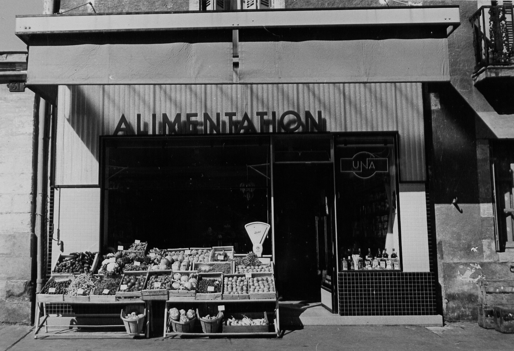 Une épicerie des années 60 (Tours, France)